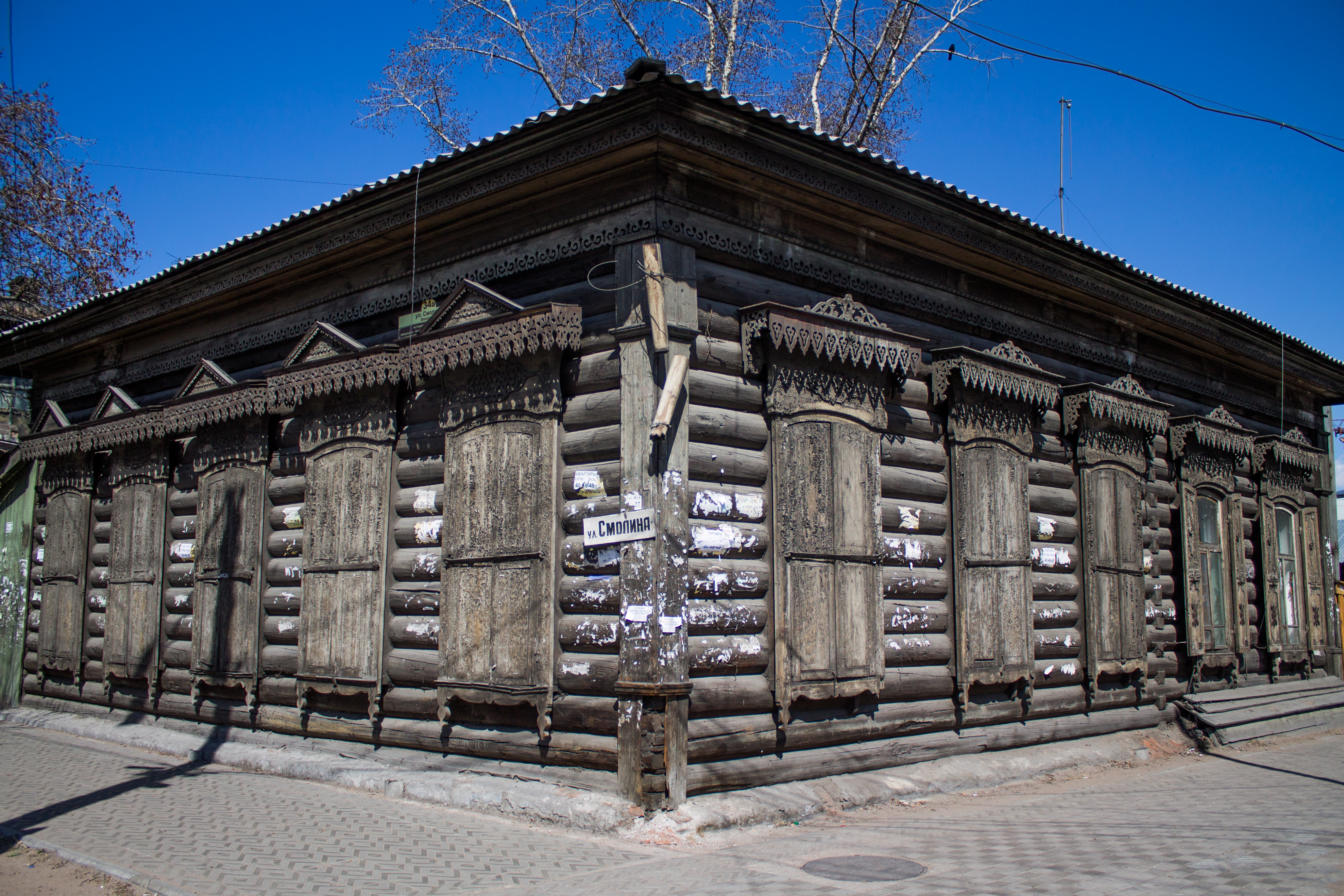 Дом жилой: улица Смолина, 34/1, Улан-Удэ, Бурятия